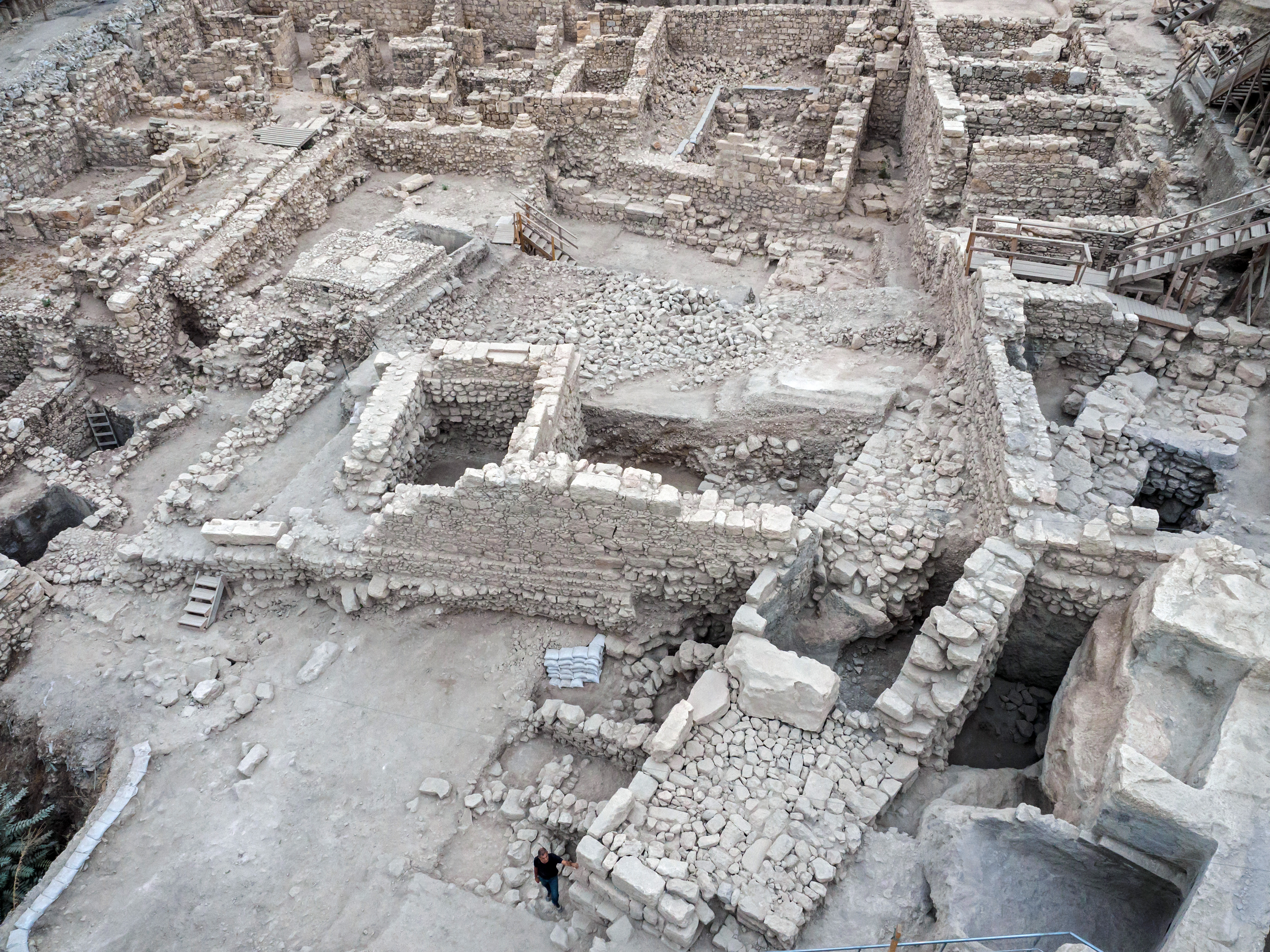 שרידי מצודת החקרא כפי שזוהו באתר הארכאולוגי חניון גבעתי בירושלים